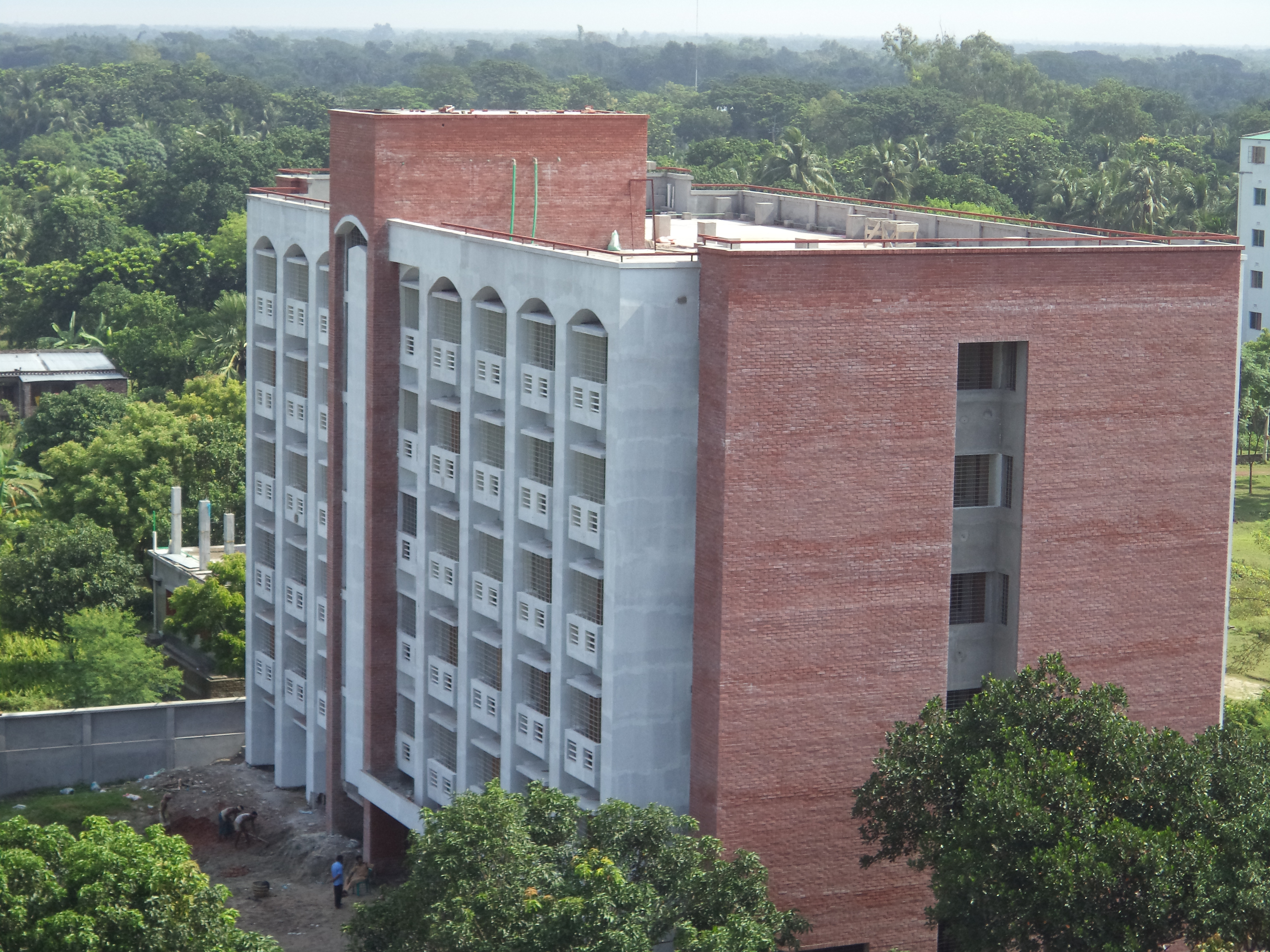 ইসলামী ব্যাংক মেডিকেল কলেজের হোস্টেল